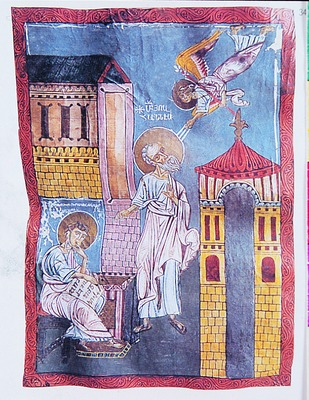 Евангелист Иоанн с учеником Прохором. Миниатюра из Могнийского Евангелия. XI век